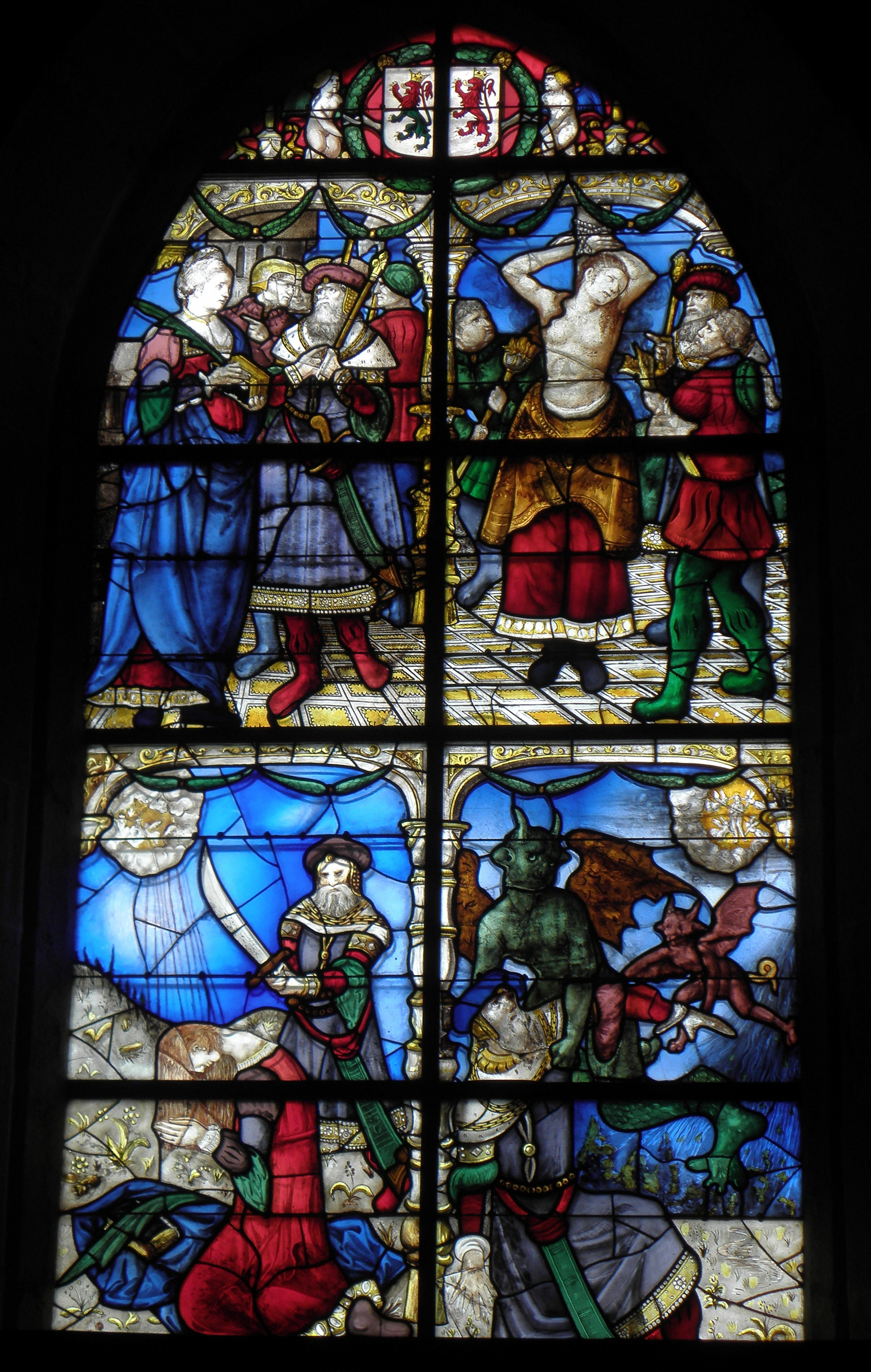 Vitrail de Sainte-Barbe de la collégiale Sainte-Marie-Madeleine de Champeaux (35).